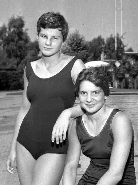 Maria Cristina Pacifici and Paola Saini (right)